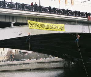 Координатор движения «ДА!» Мария Гайдар и лидер «Молодежного Яблока» Илья Яшин (висят на альп.тросах) в знак протеста против изменений выборного законодательства провели акцию на Большом каменном мосту. Лозунг: «Верните народу выборы, гады!».